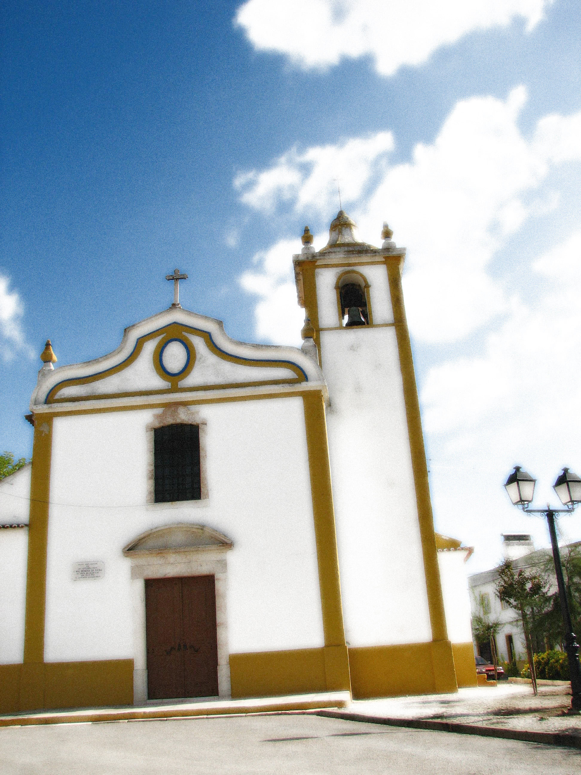 igreja matriz de Cano